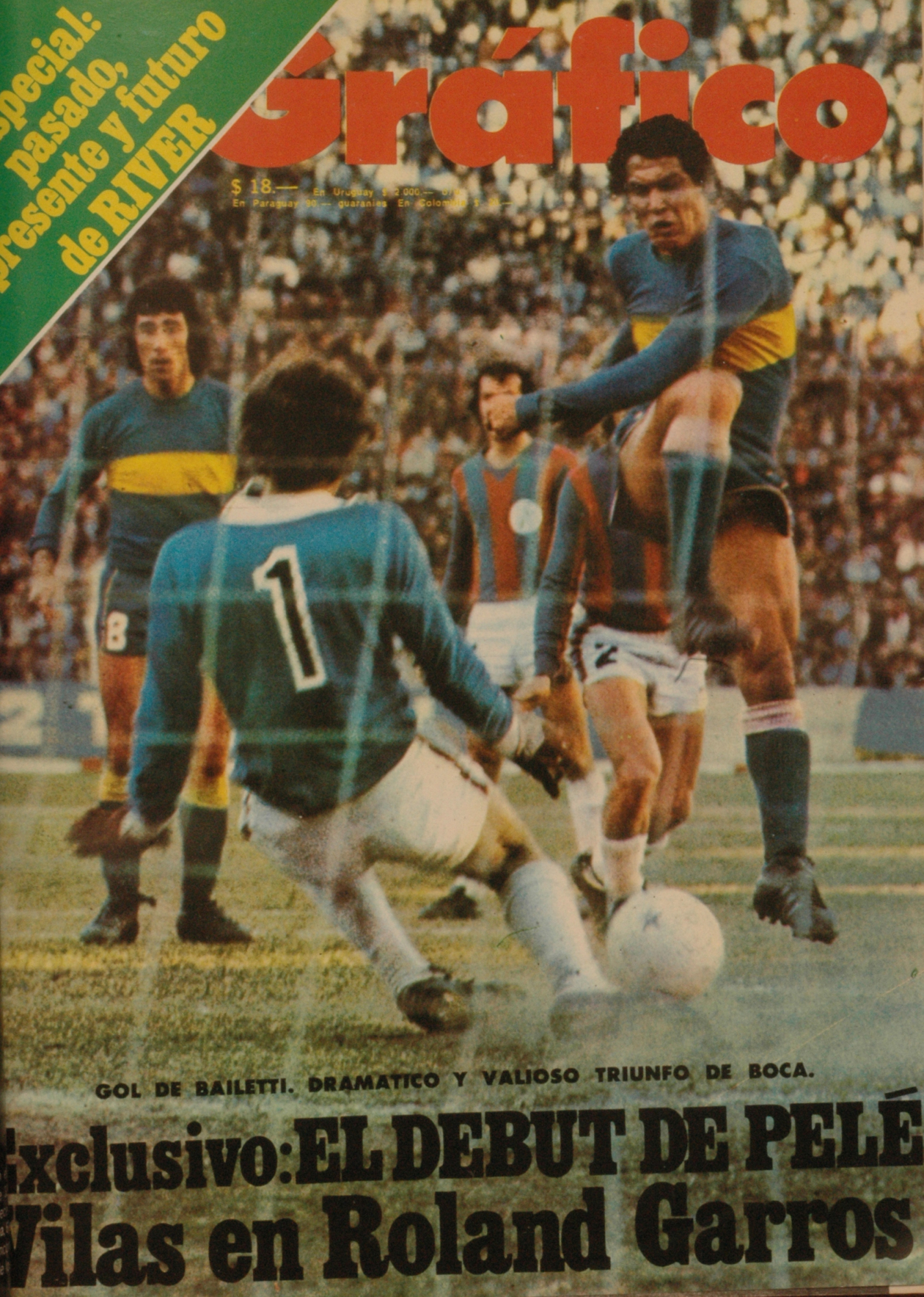 El Grafico del 18 de Junio de 1975. Edicion 2906